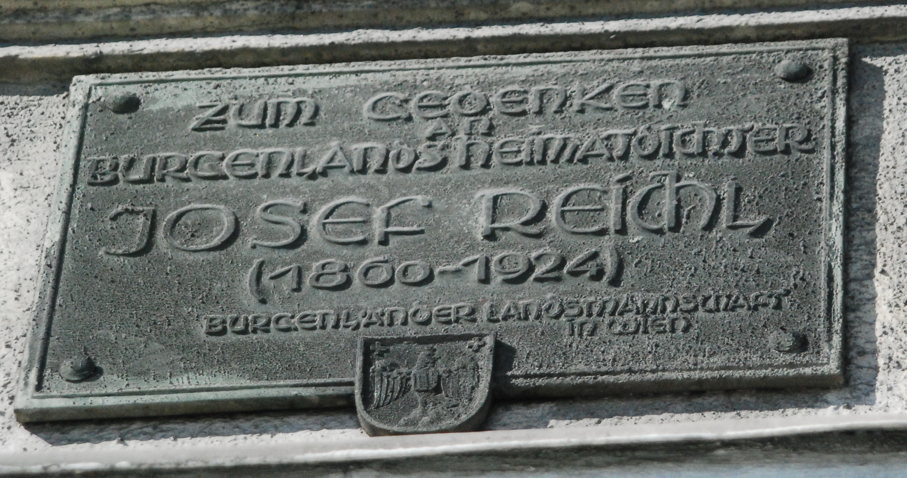 Gedenktafel für den Dichter Josef Reichl.